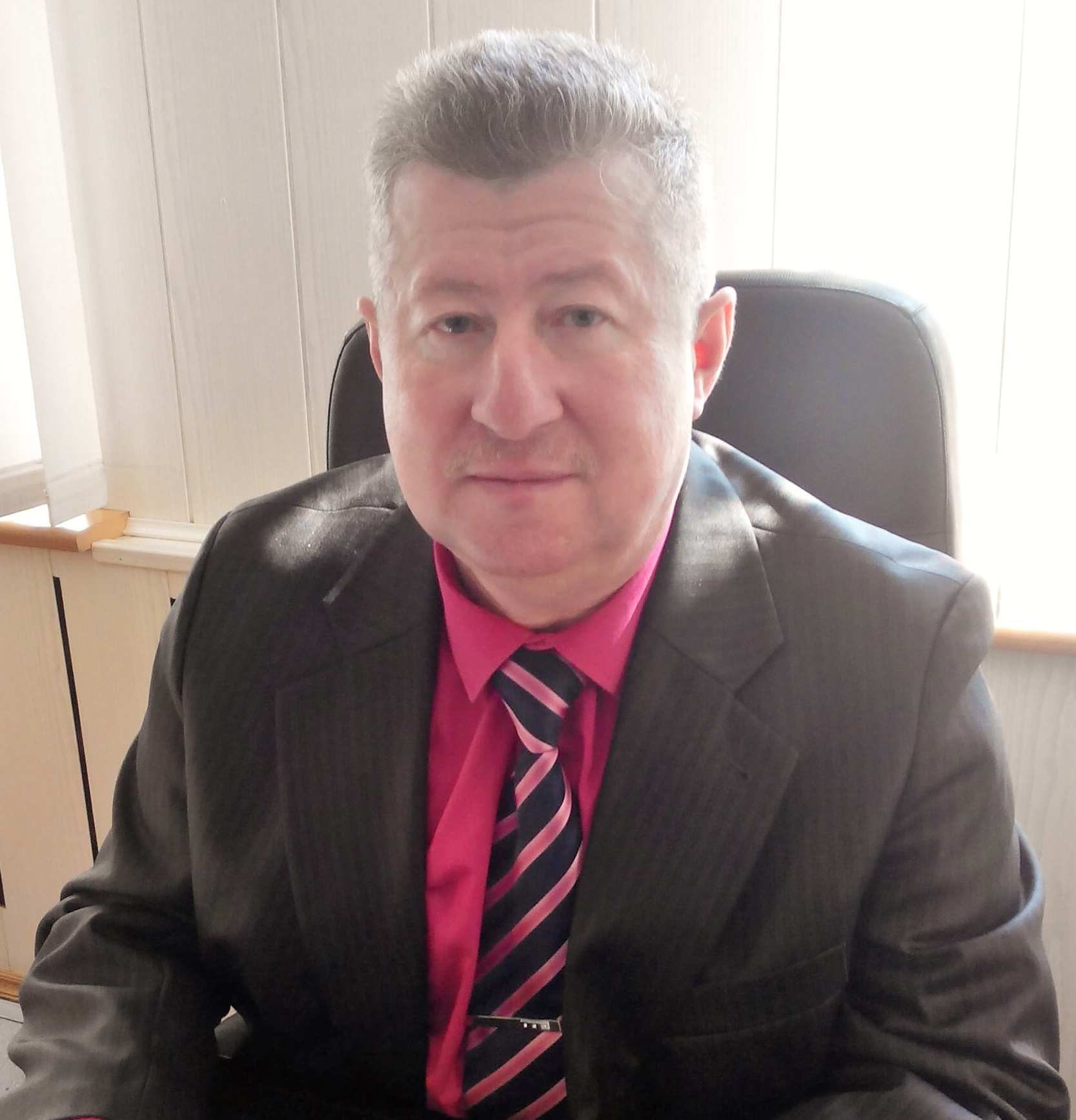 Ректор Мелітопольського державного педагогічного університету імені Богдана Хмельницького. м. Мелітополь, 2017 р.